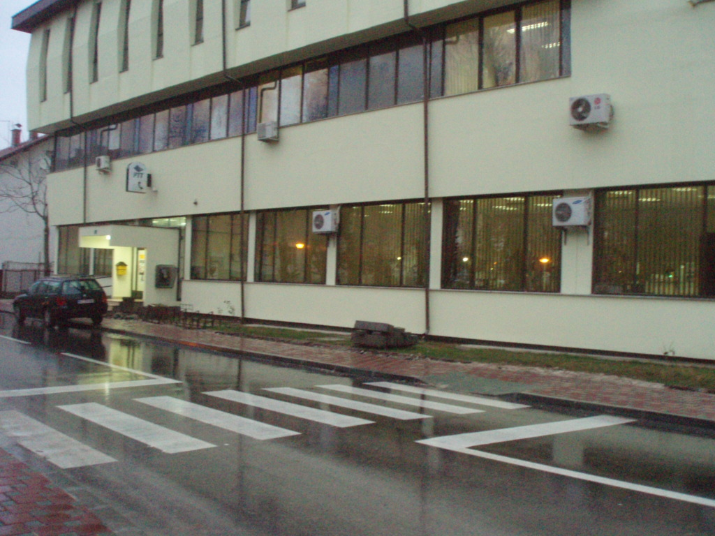 Zgrada Pošte u Sanskom Mostu